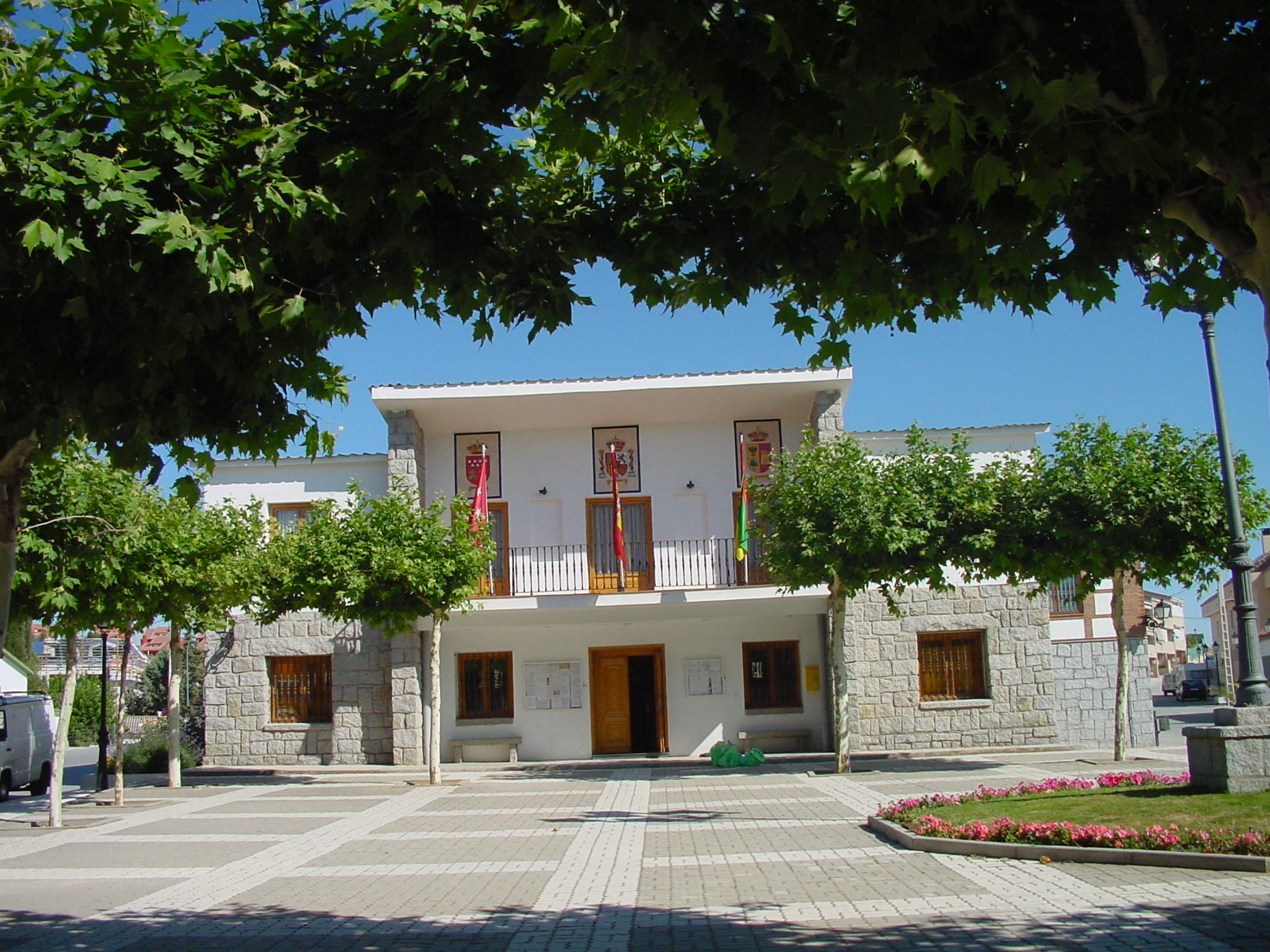 Ayuntamiento de Quijorna.